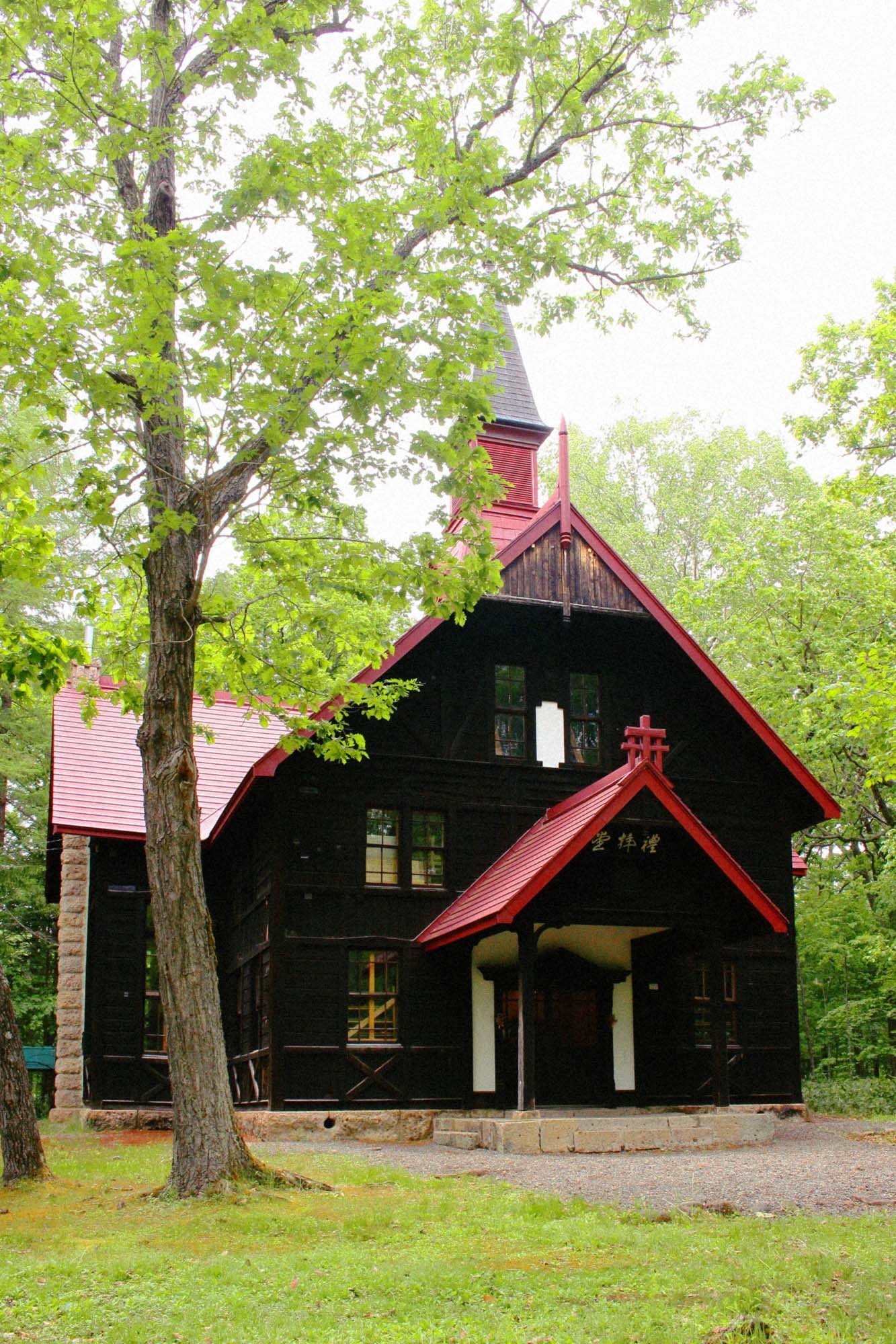 北海道家庭学校礼拝堂、1919年建築、北海道指定有形文化財 ※北海道家庭学校の許可を得て撮影